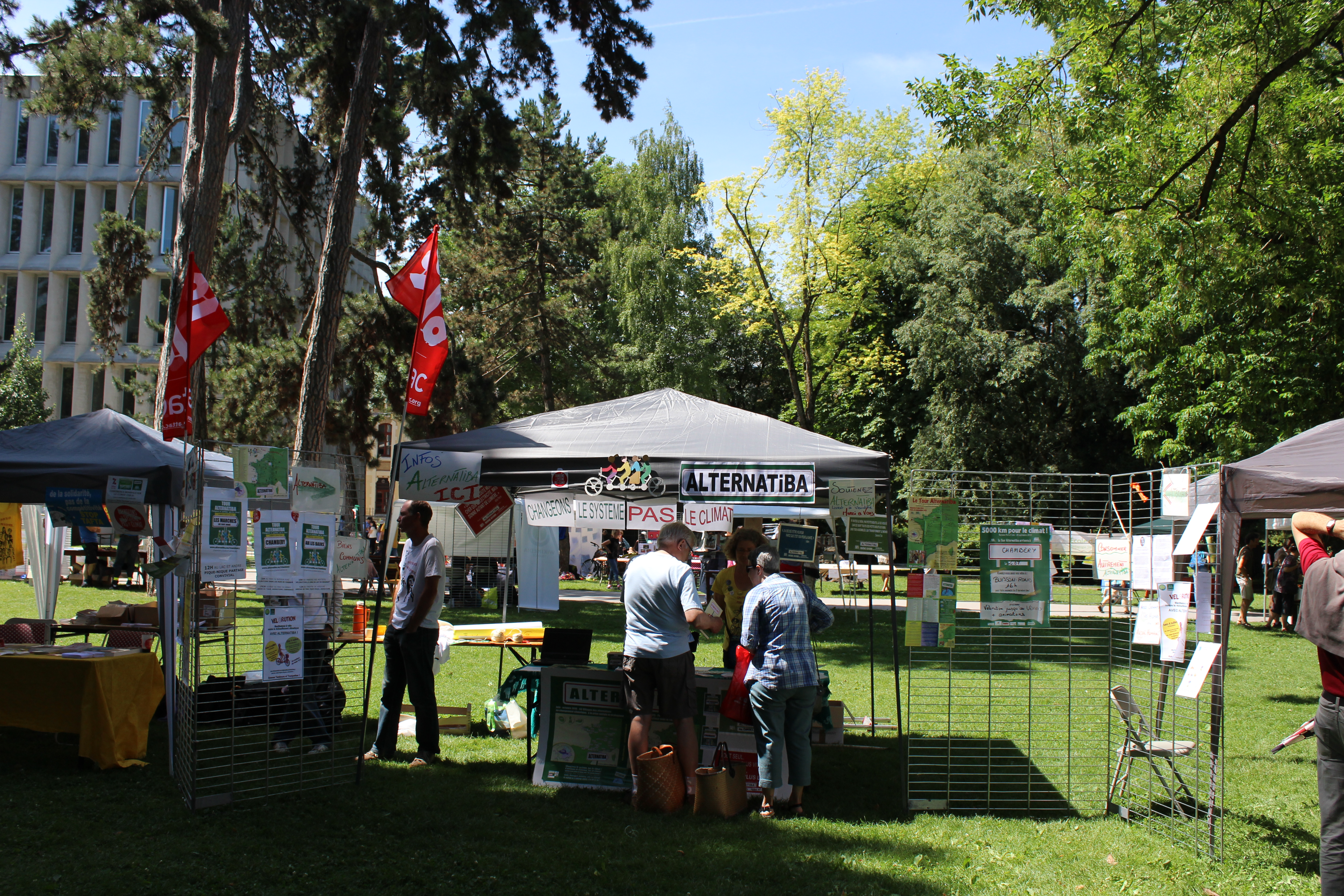 Le stand Alternatiba lors de l'écofestiv à Chambéry, le 13 juin 2015.